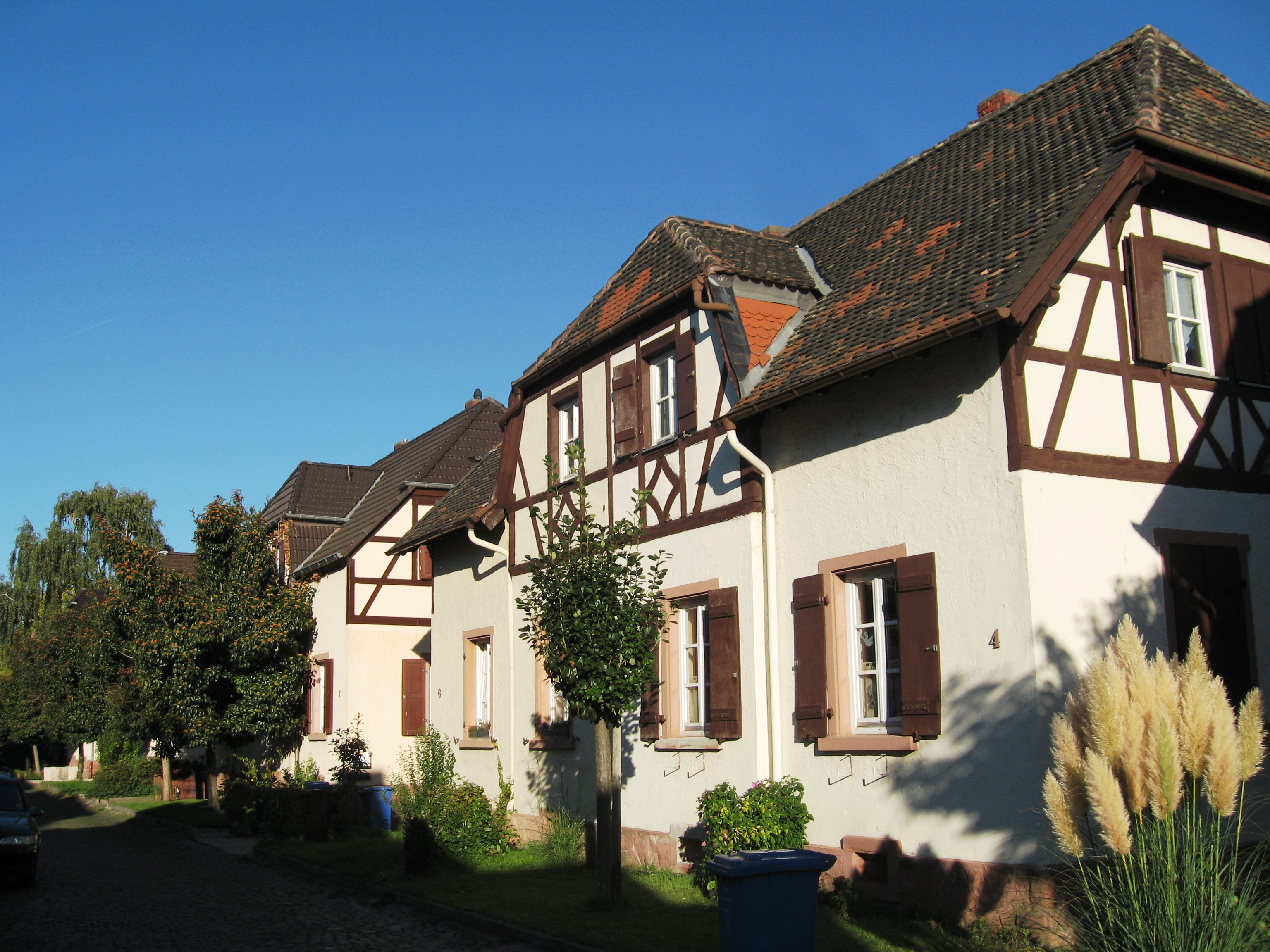 Worms, Neuhäuser Weg 4